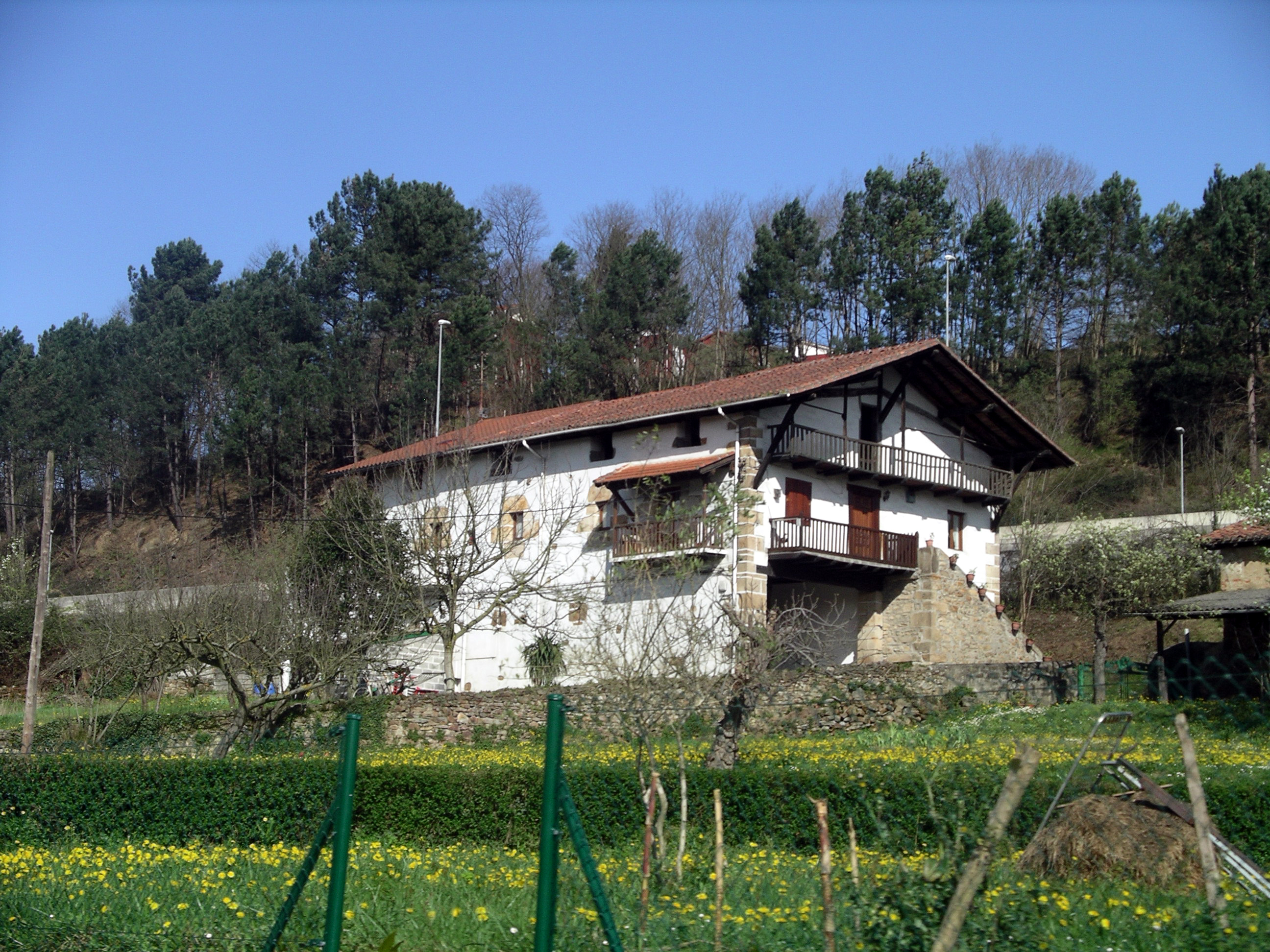 Aperribai auzoan kokatuta dagoen baserri bat, Galdakoko udalerrian (Bizkaia).